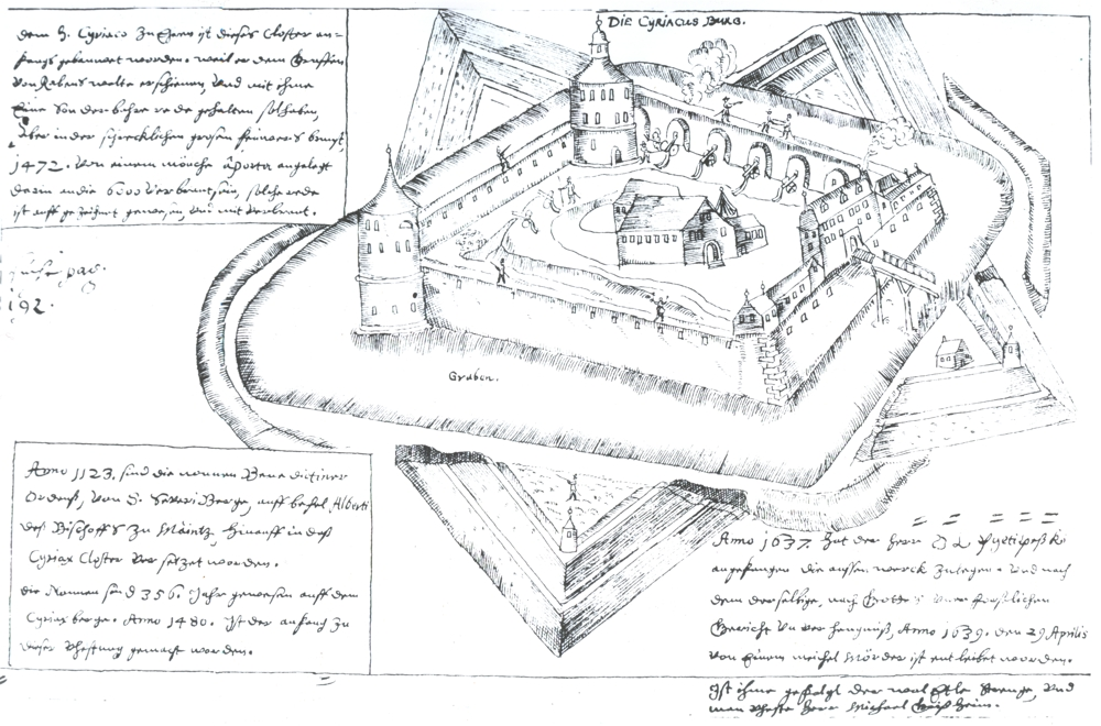 Kastell Cyriaksburg, Federzeichnung von Samuel Fritz, um 1670